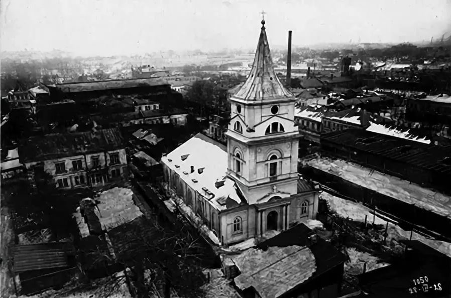 Евангелическо-лютеранская церковь святого Михаила и ЦАГИ в Москве